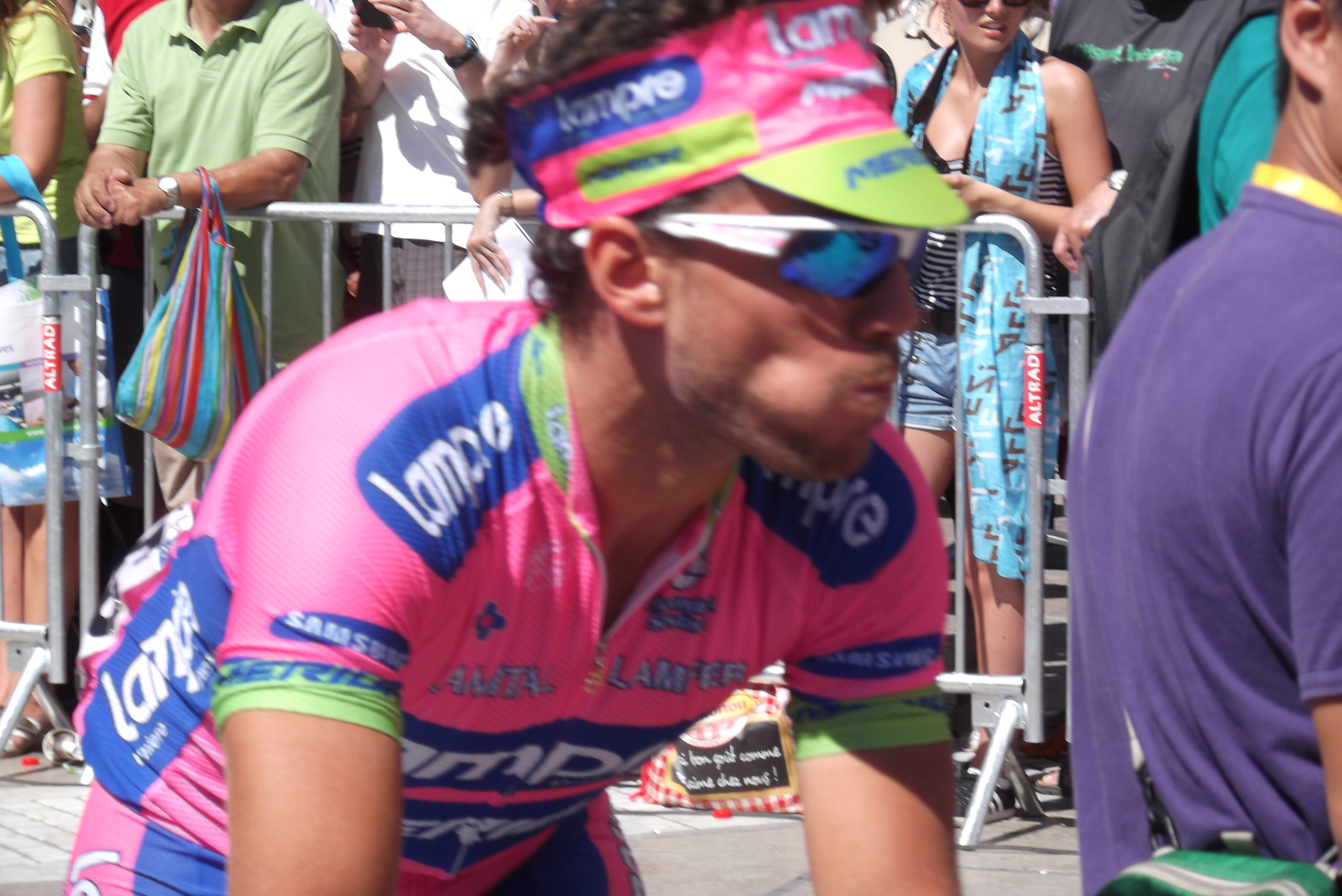 Roberto Ferrari à Montpellier.